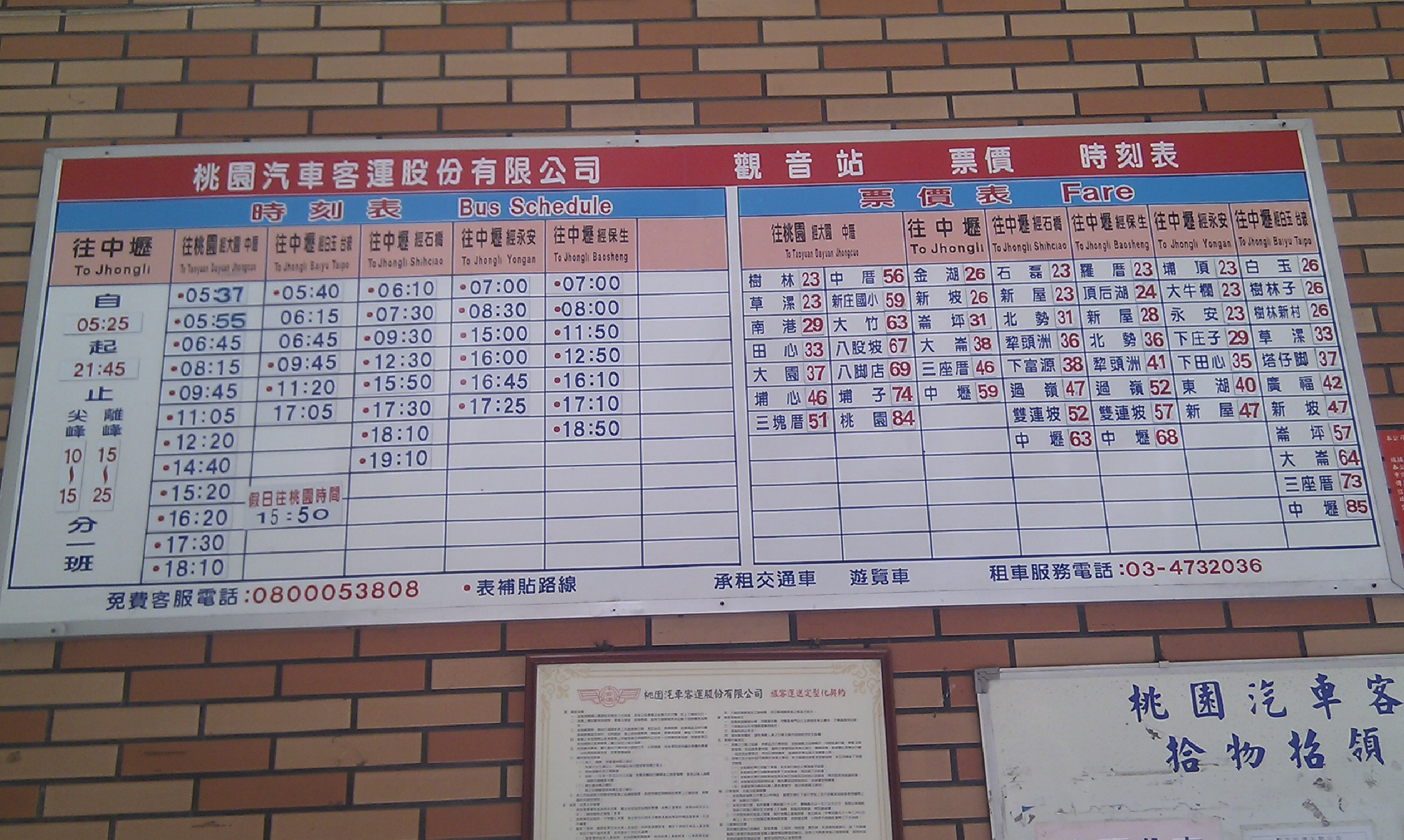 中文（台灣）: 桃園客運觀音站票價時刻表